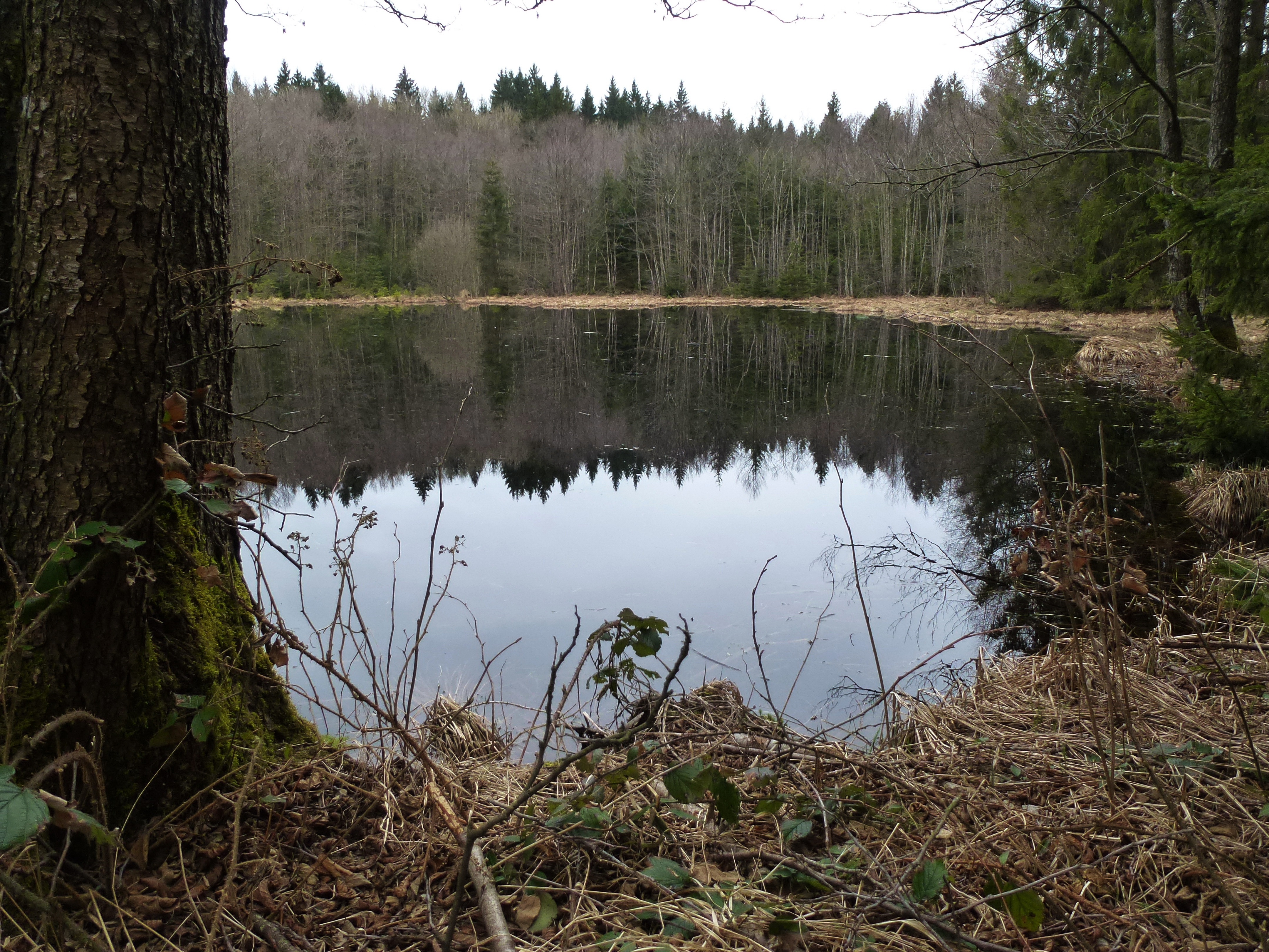 Toteisloch, ca. 450m nördlich von Abtsried (Sandbergweiher), der Gemeinde Dießen am Ammersee zugeordnet. Aufnahmerichtung: von Norden nach Süden